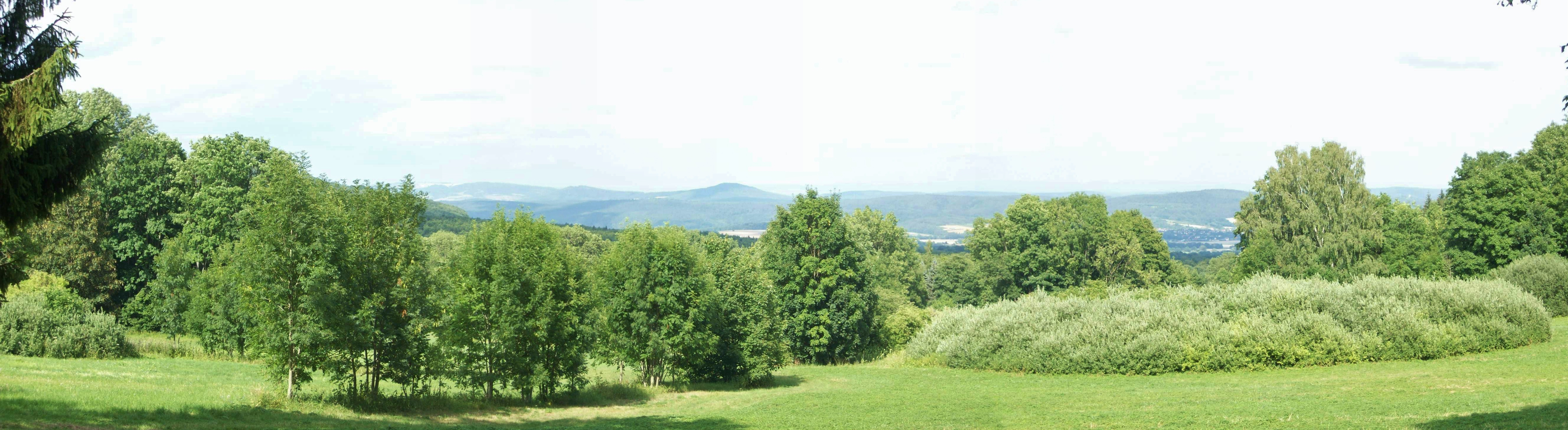 Blick vom Schweinfurter Haus am Gangolfsberg auf das Streutal Richtung Sondheim